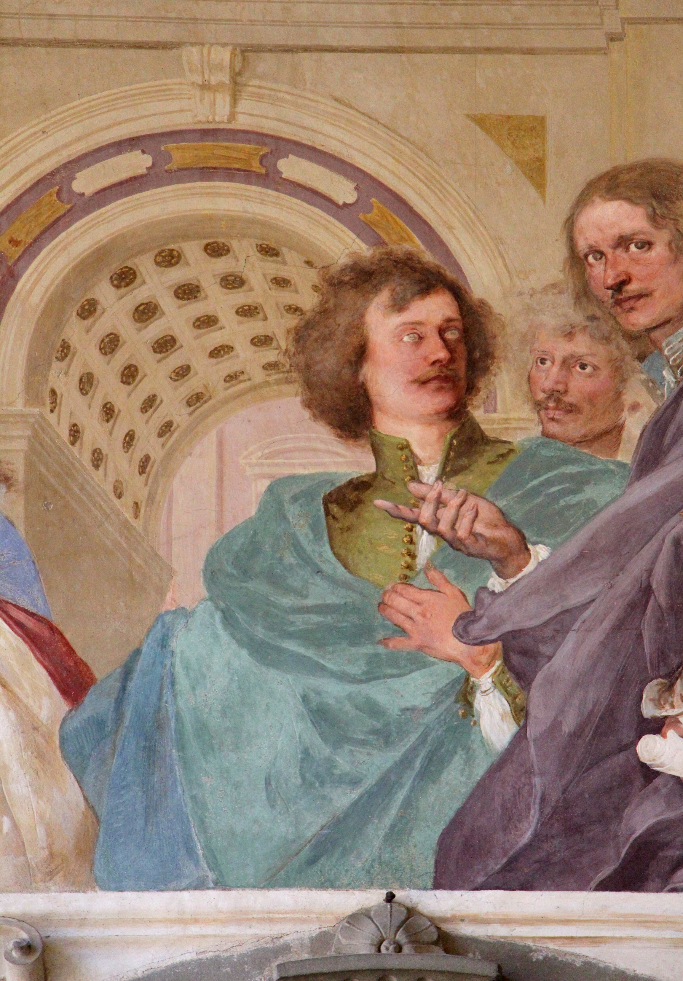 Villa medicea della Petraia - MIBAC The making of this document was supported by Wikimedia CH. (Submit your project!) For all the files concerned, please see the category Supported by Wikimedia CH. This is a photo of a monument which is part of cultural heritage of Italy.